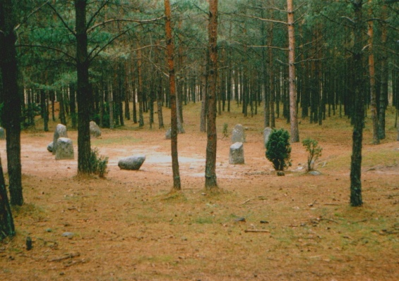 Cmentarzysko w Wesiorach- kamienne kregi